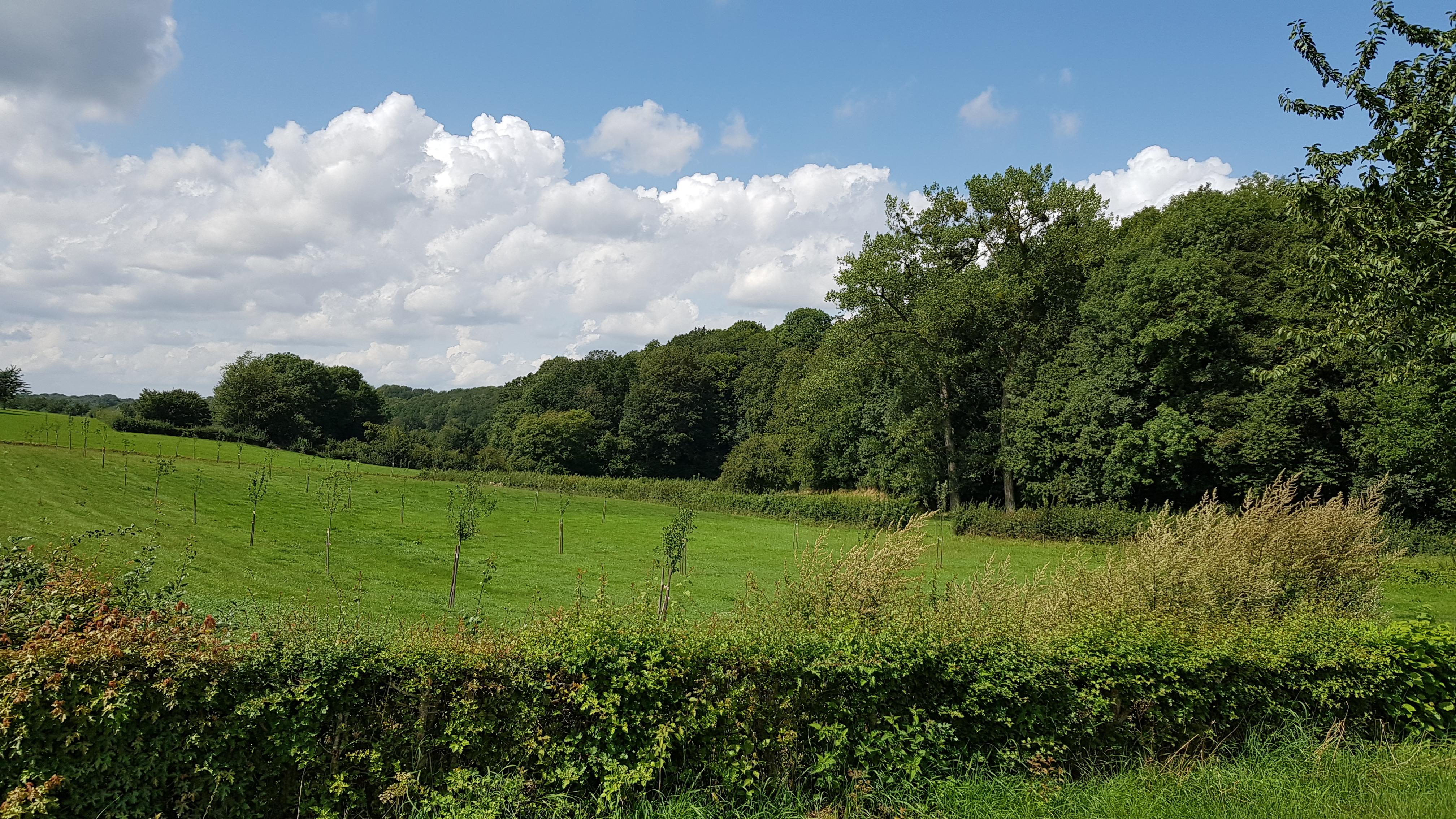 Herkenradergrub, Moerslag / Sint Geertruid, Nederland